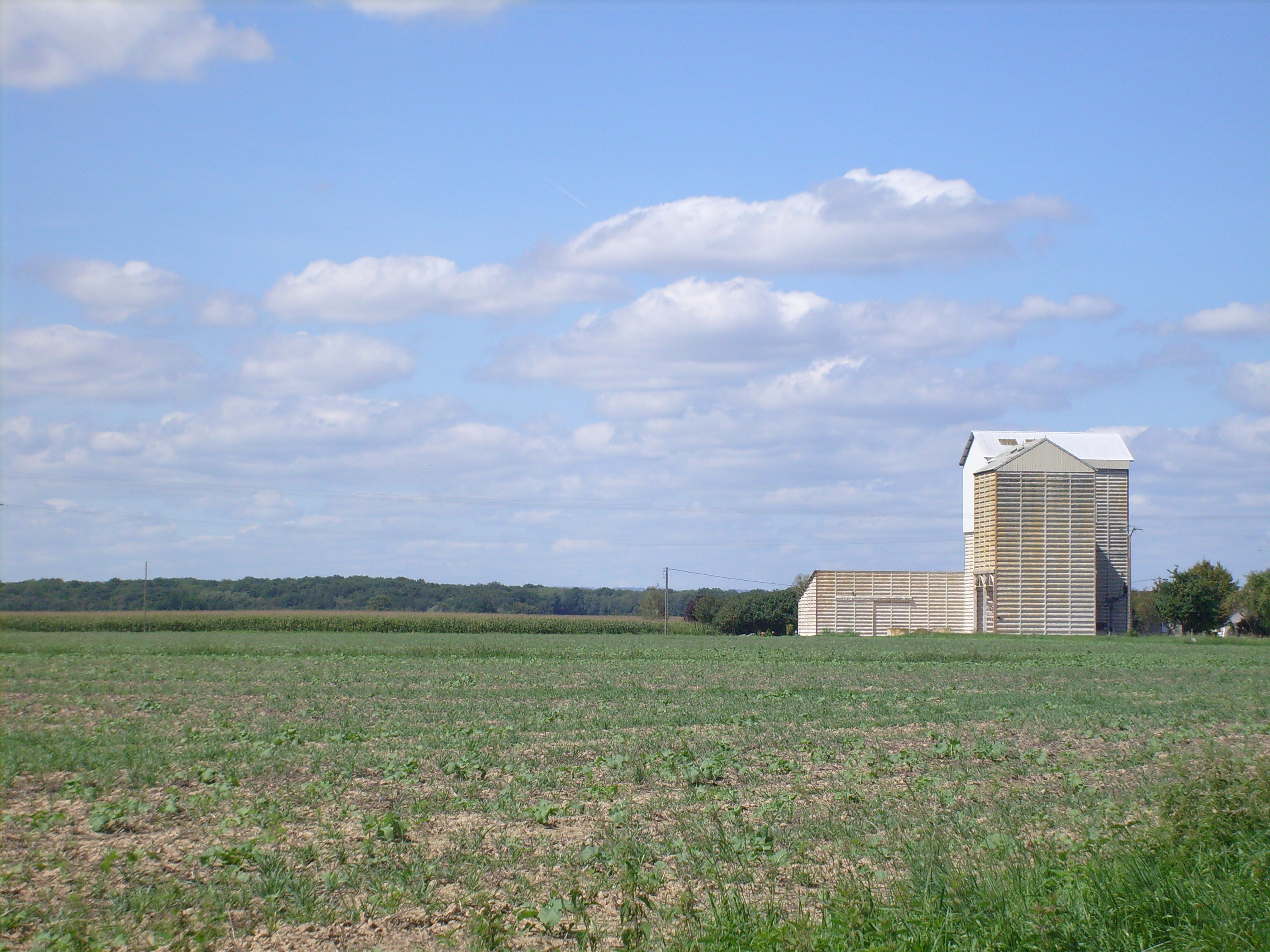 Osnay avec le silo et le forêt de Gergy en arrière plan.